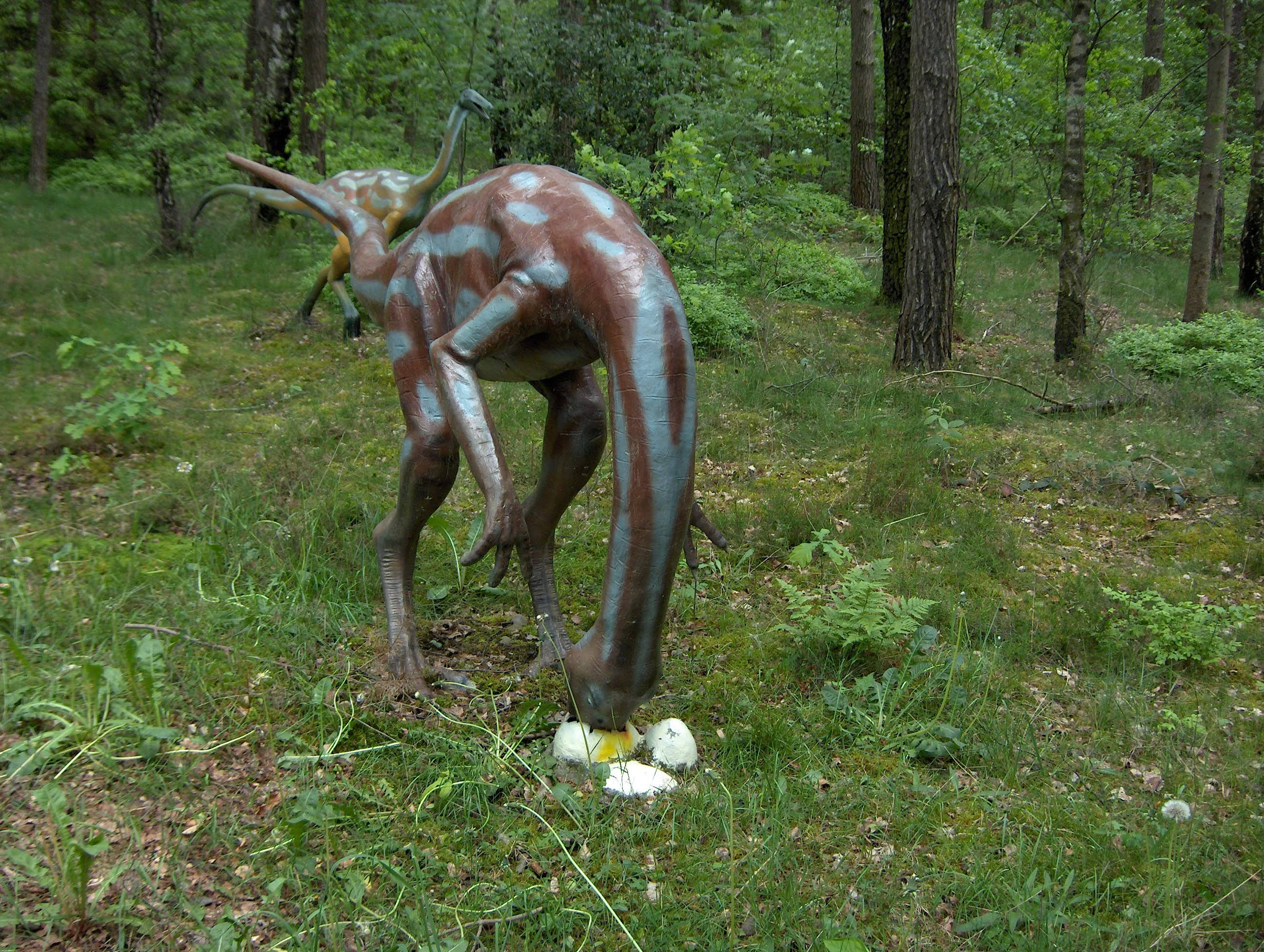 Modell eines Ornithomimus im Dino-Park Münchehagen (Niedersachsen)